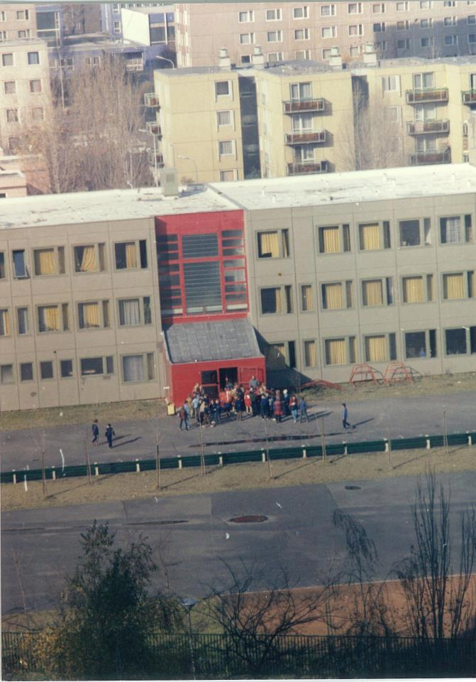 Bethlen Gábor Szakgimnázium épülete, Budapest